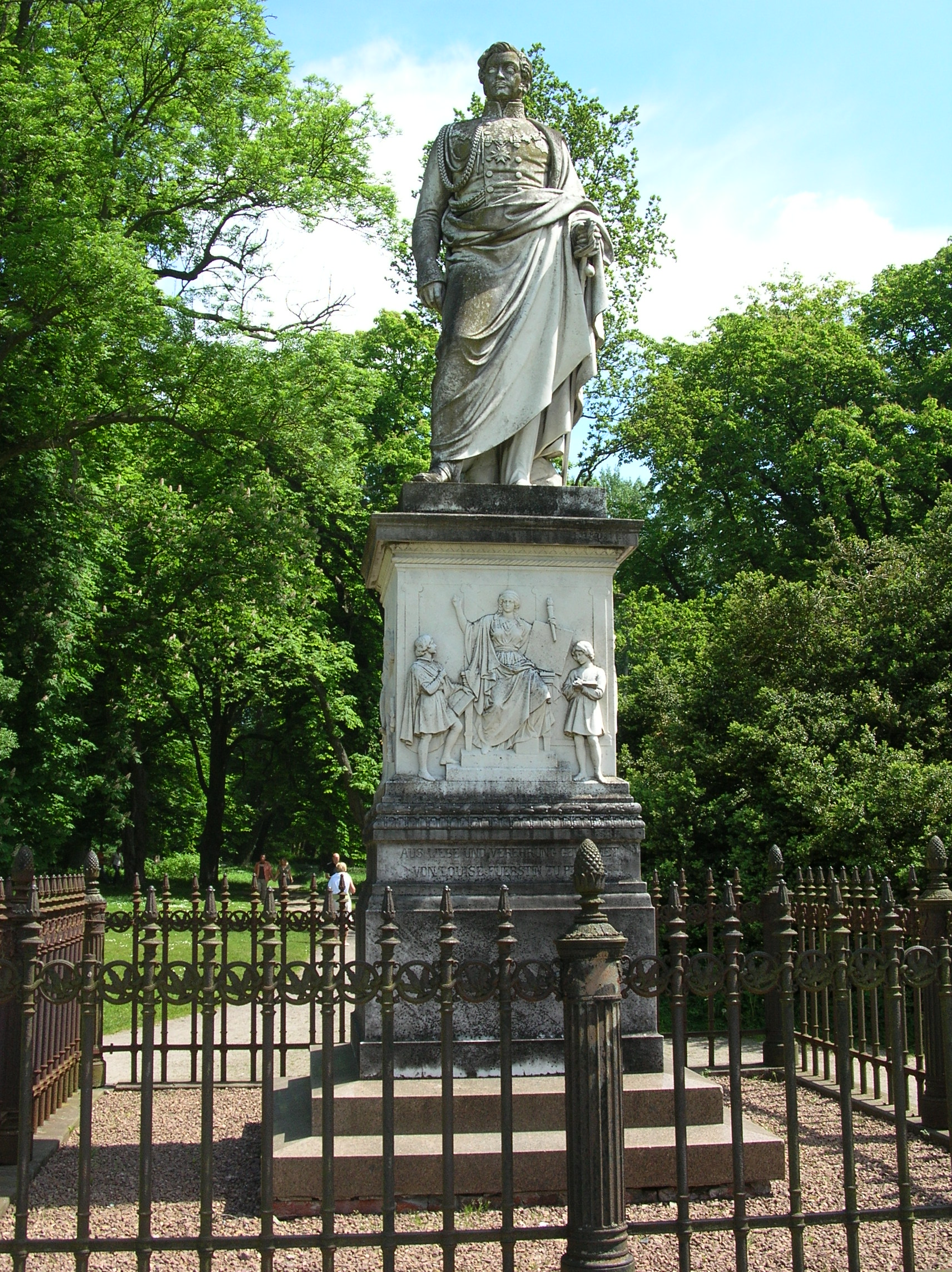 Statue des Fürsten Wilhelm Malte I., im Park von Putbus